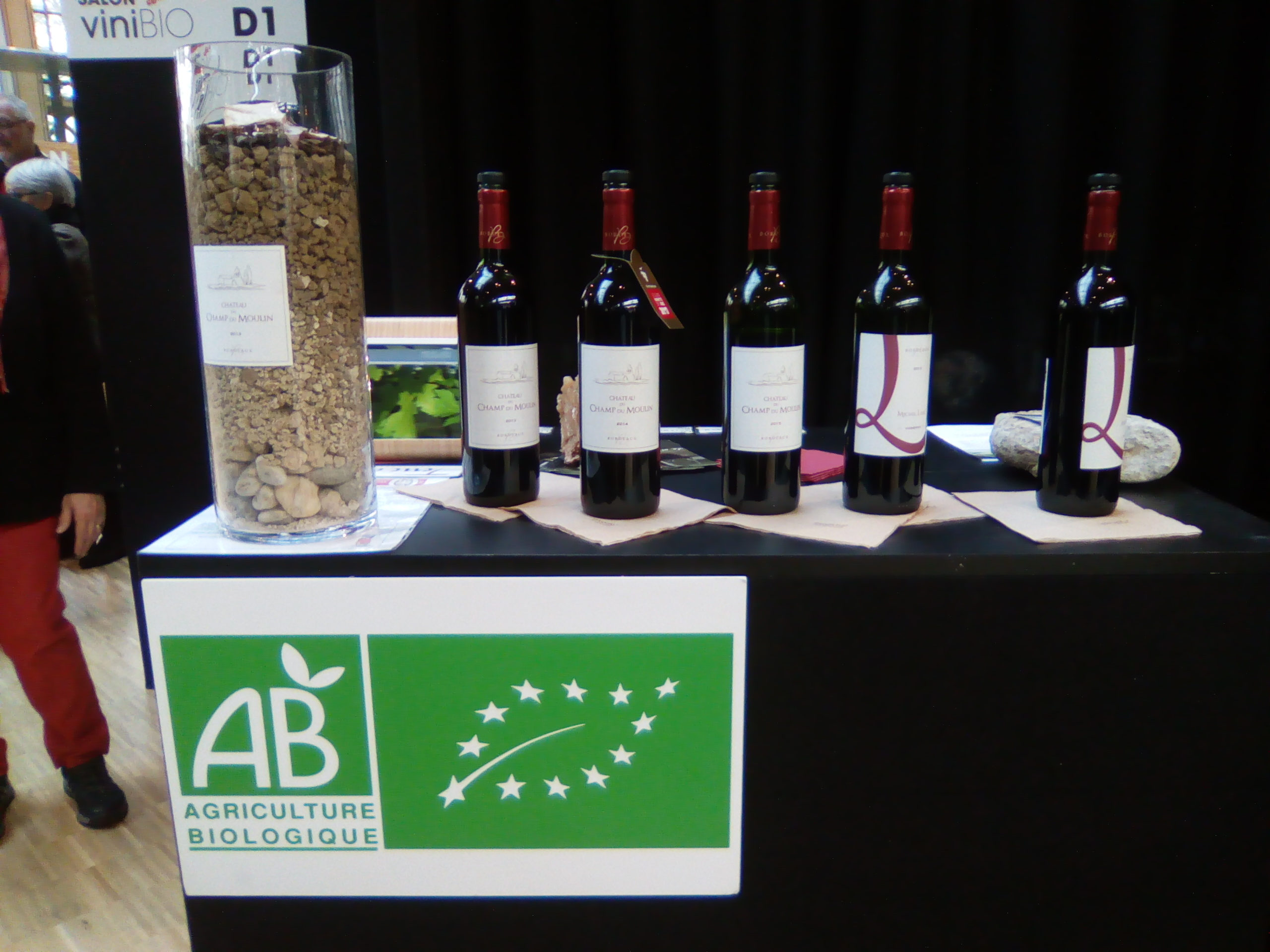 Salon vinibio.